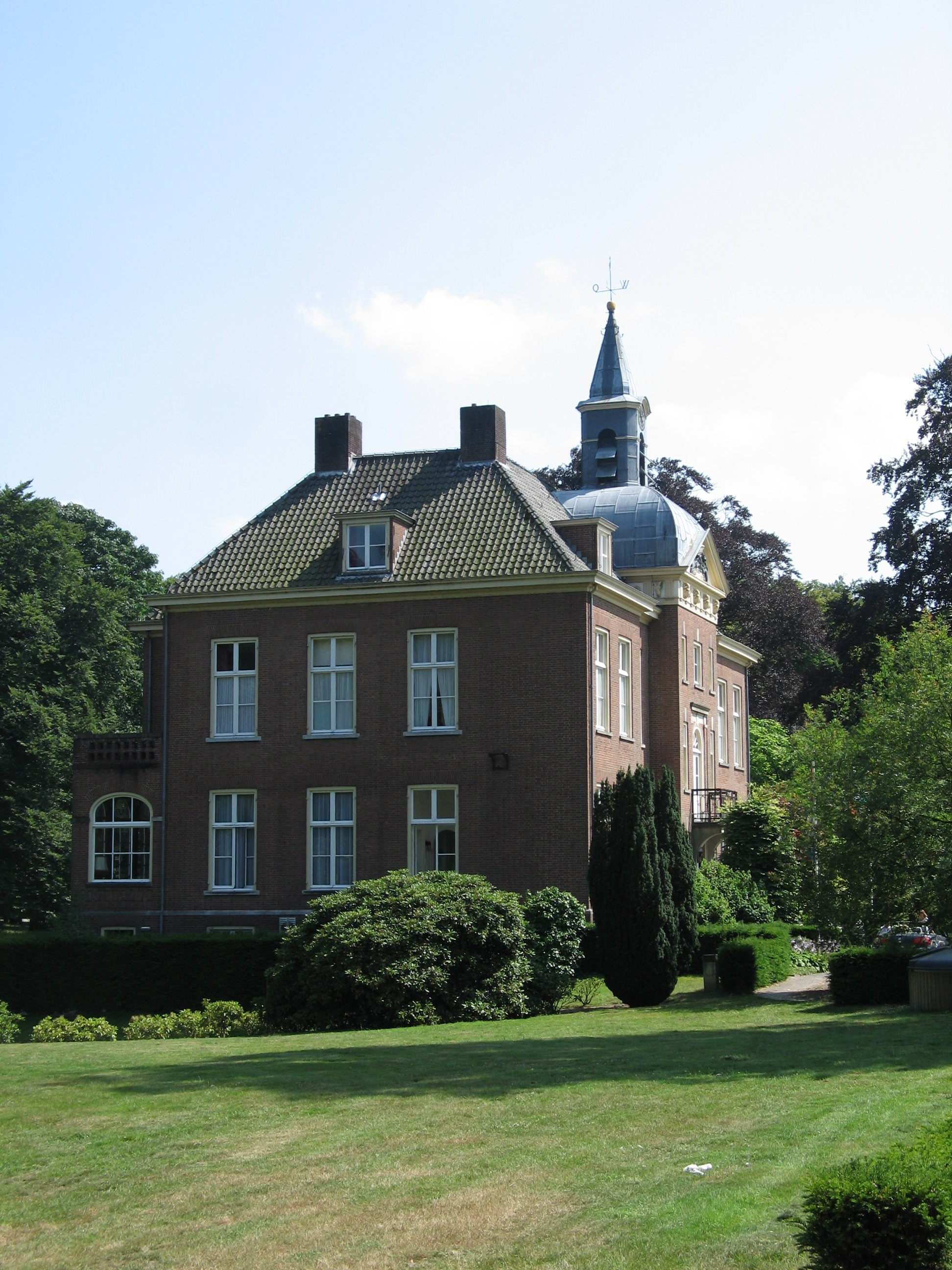 Onderdeel van Kasteel Hoekelum, Bennekom Kasteel Hoekelum, Rijksmonument